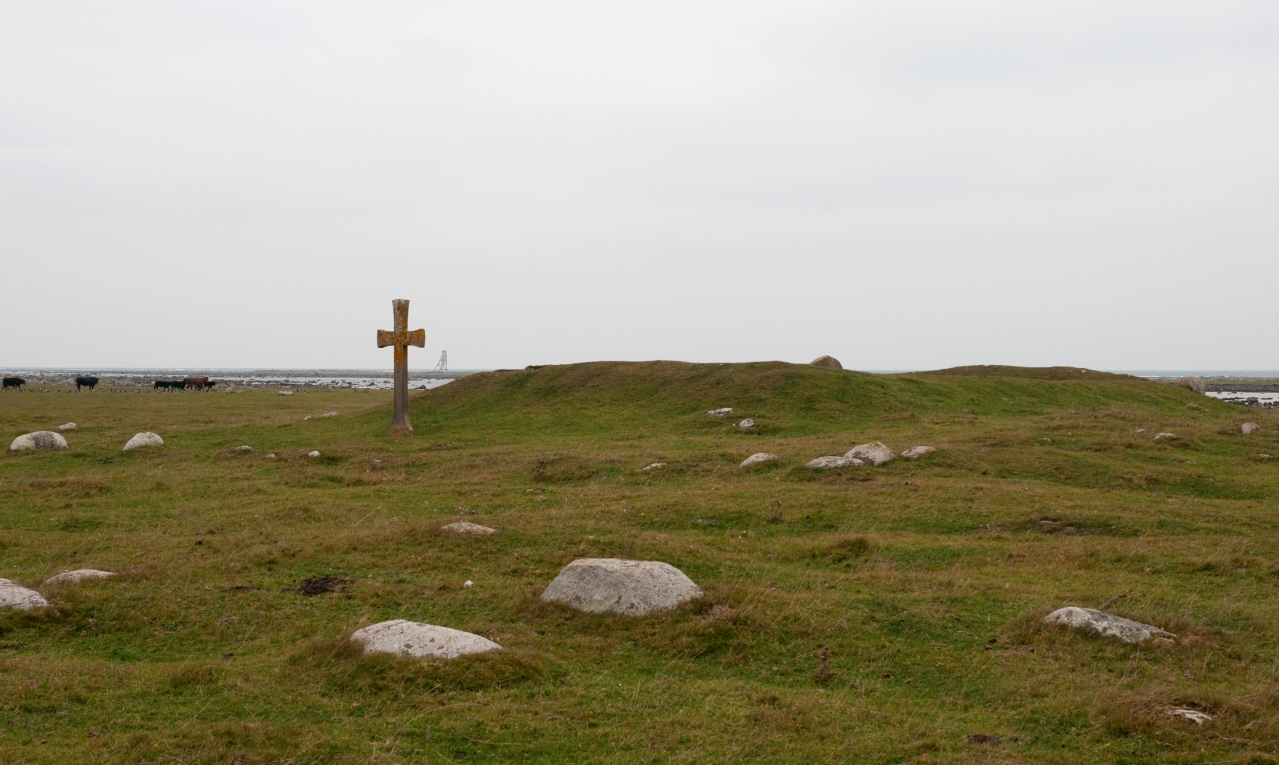 S:t Johannes kapell vid Kyrkhamn i Mörbylånga, Öland